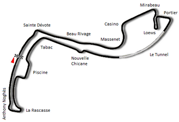 Verzia trate z rokov 1986 až 1996.